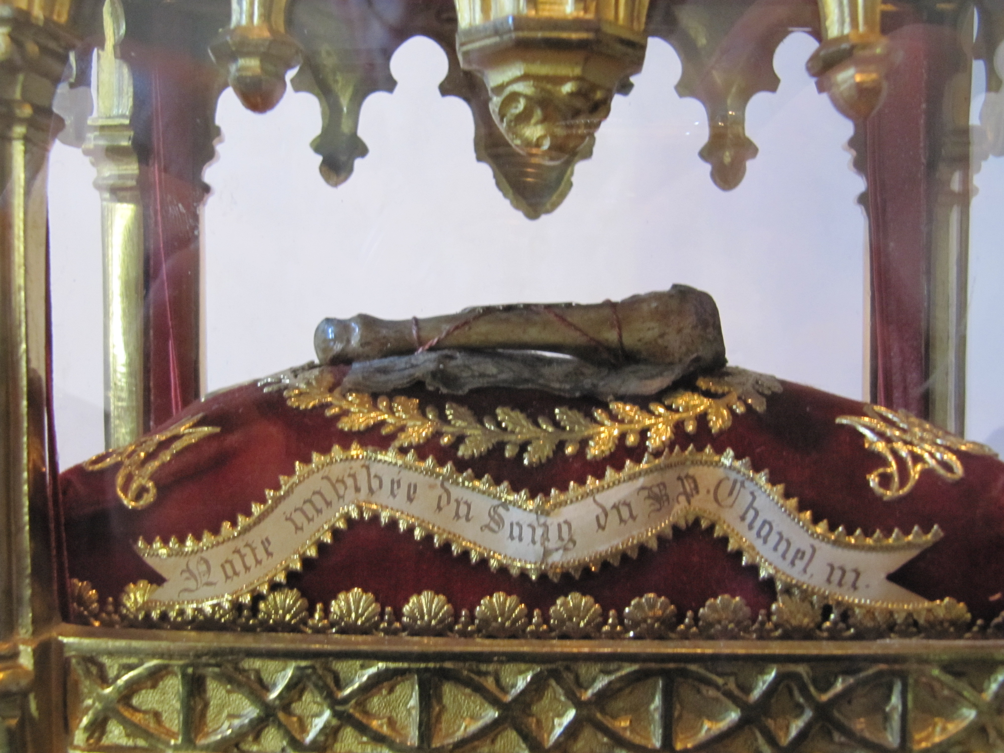 Мощи святого Пьера Шанеля, из фондов дома-музея "Дом Паулины Жарико", Лион, Франция